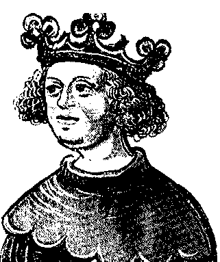 Konrad IV., König des Heiligen Römischen Reiches (1237–1254)